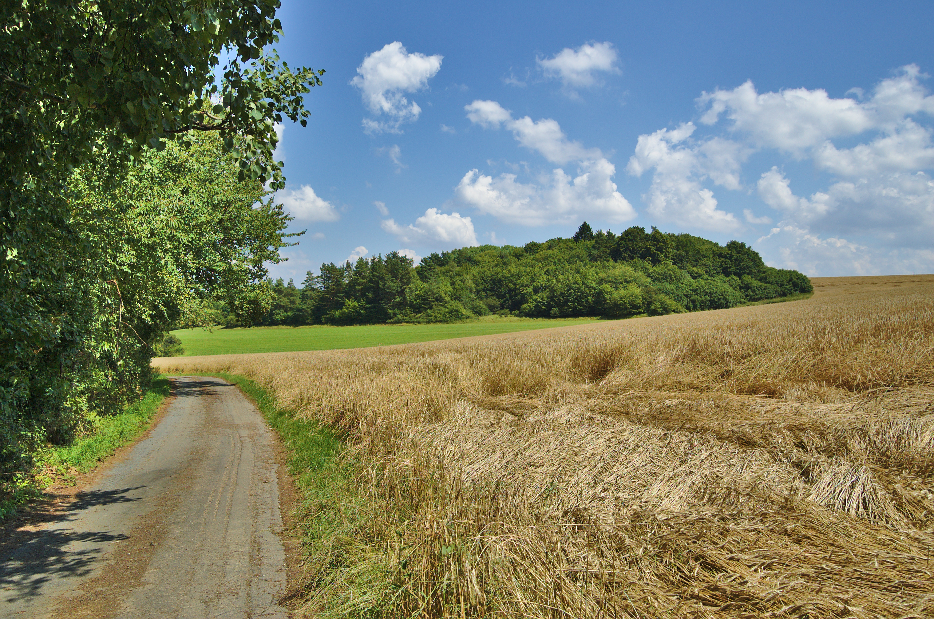 Přírodní památka Skalky, okres Prostějov